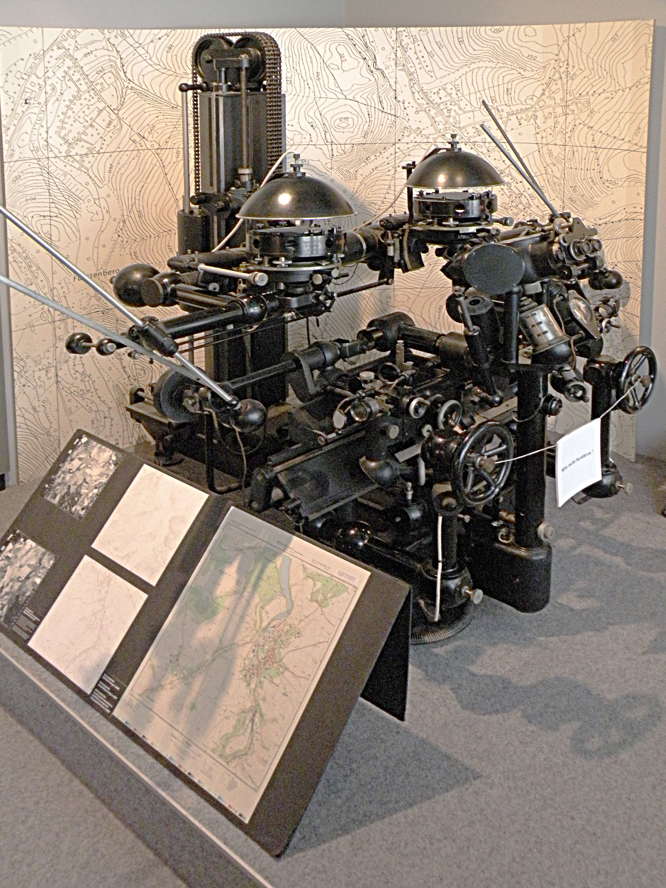 Стереокомпаратор Пульфриха в Оптическом музее Йены